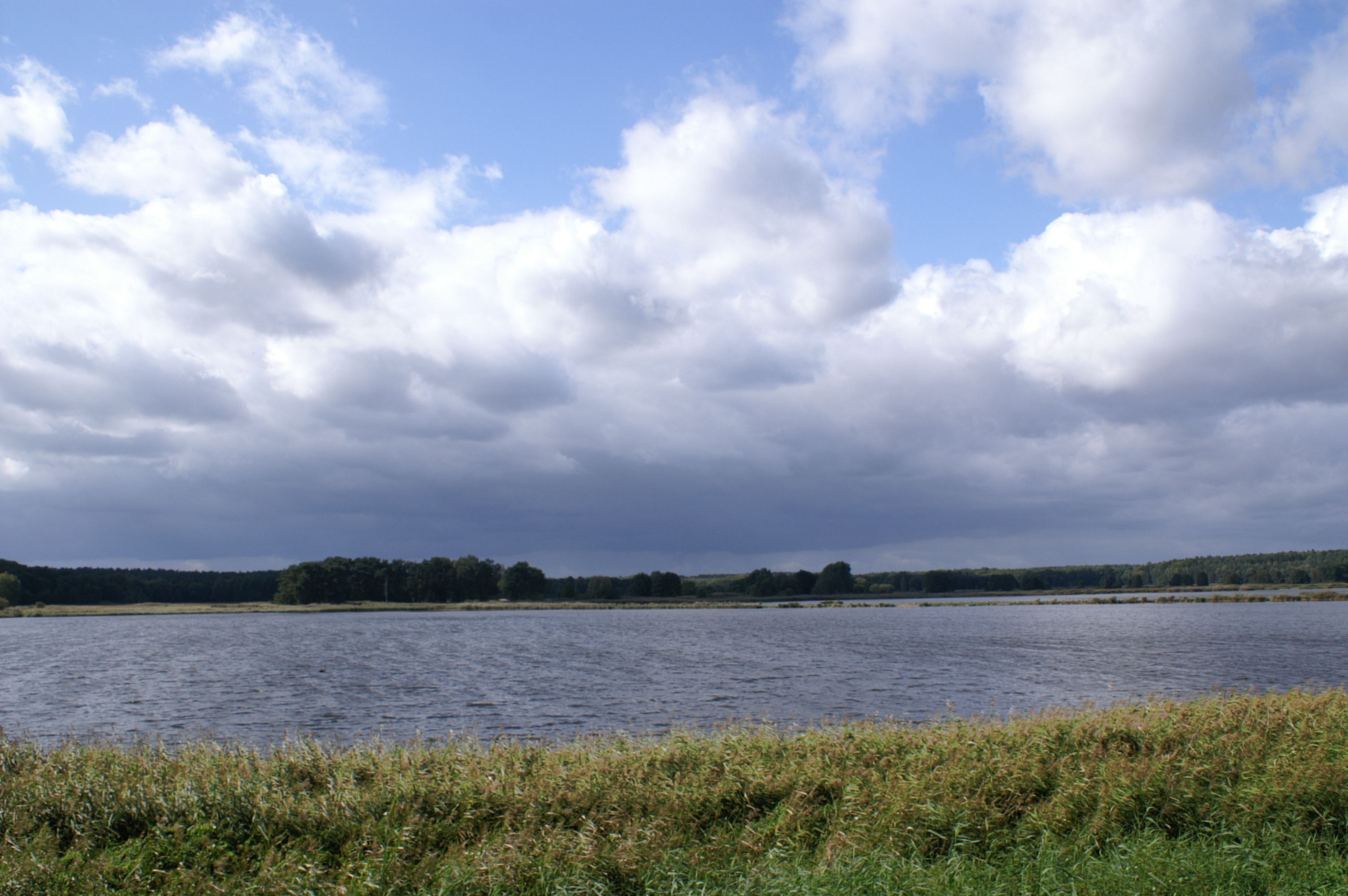 Blick über das Naturschutzgebiet „Fischteiche Blumberger Mühle“ bei Angermünde